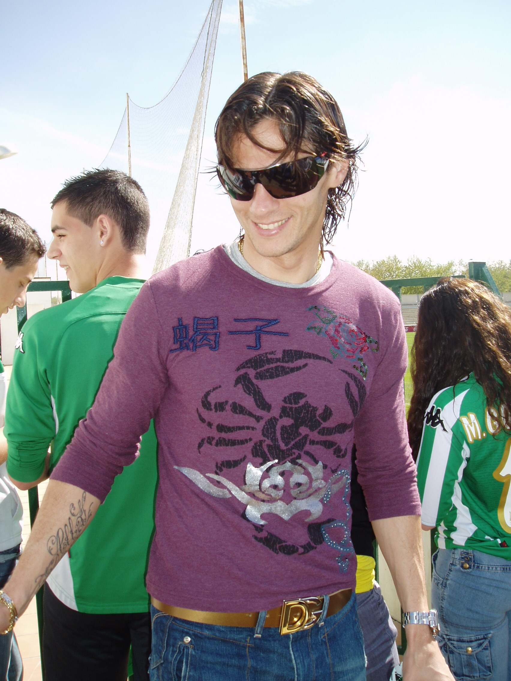 El jugador Jesús Capitán Prada , "Capi", a la salida de los entrenamientos